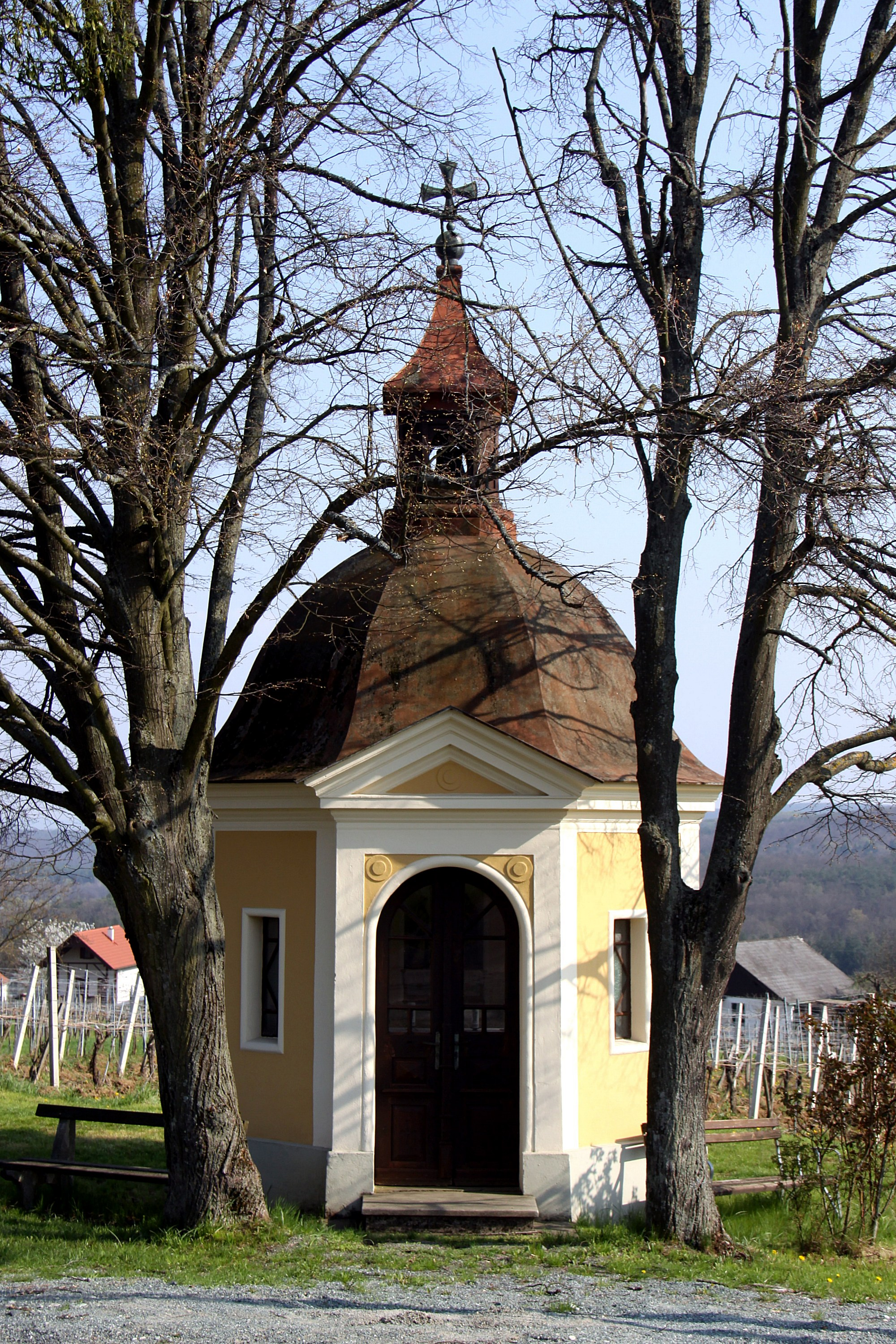 Kohfidisch - Dreifaltigkeitskapelle Csaterberg (auch Hl.-Geistkapelle, Weinkapelle)